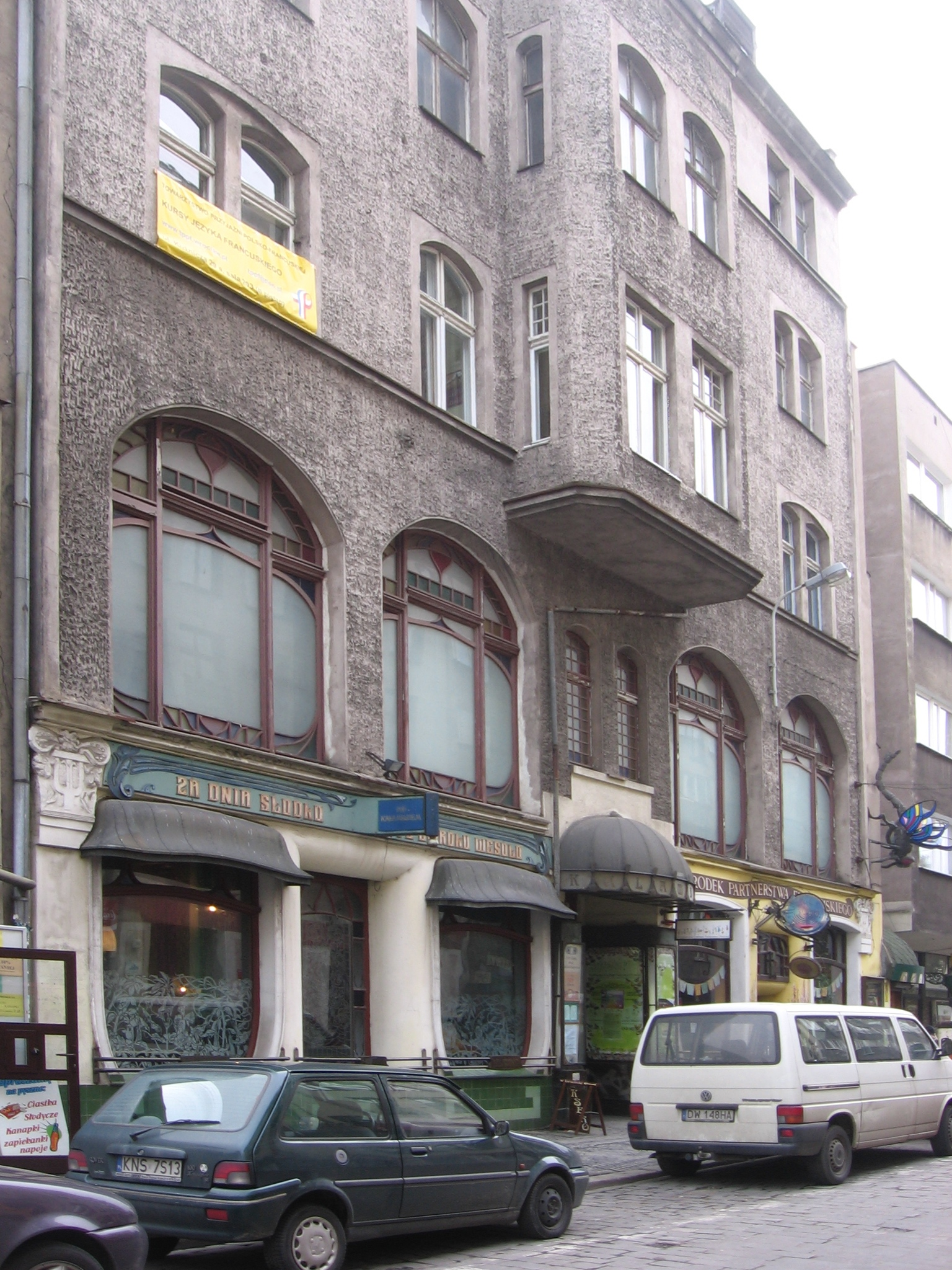 Ośrodek Teatru Otwartego "Kalambur" we Wrocławiu, ul. Kuźnicza 29